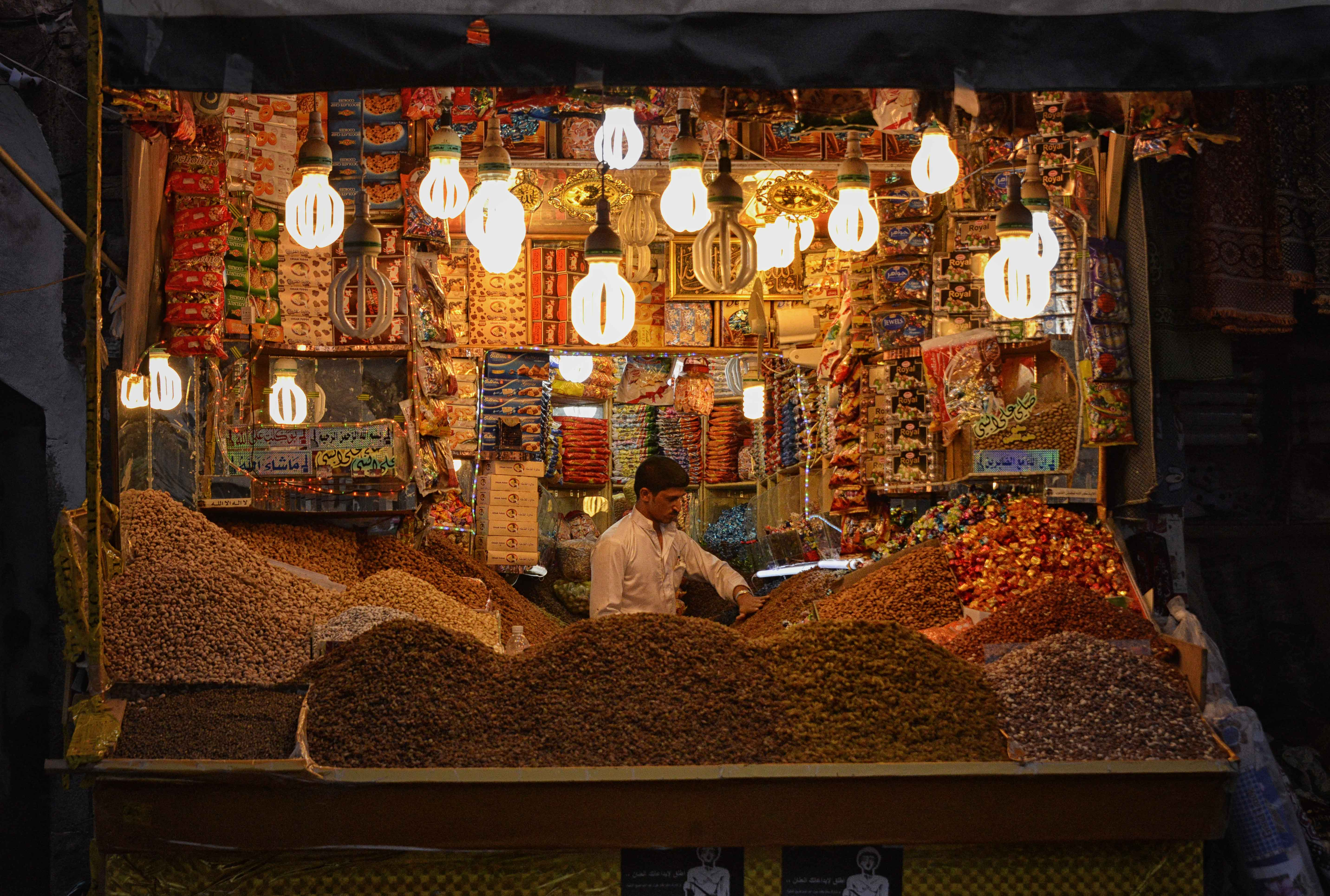 Yemen